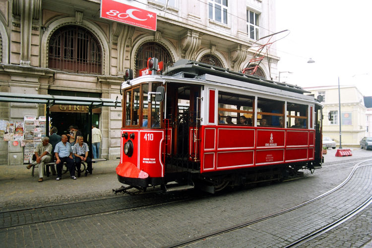 Villamos